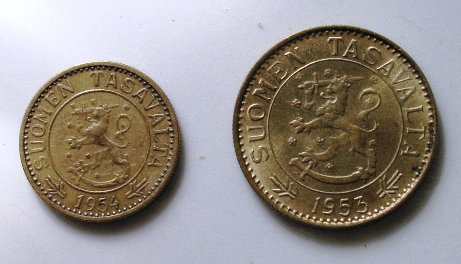 10 ja 50 markan rahat vuosilta 1953 ja 1954 joissa Koisjärvellä sijaitseva mänty kääntöpuoli